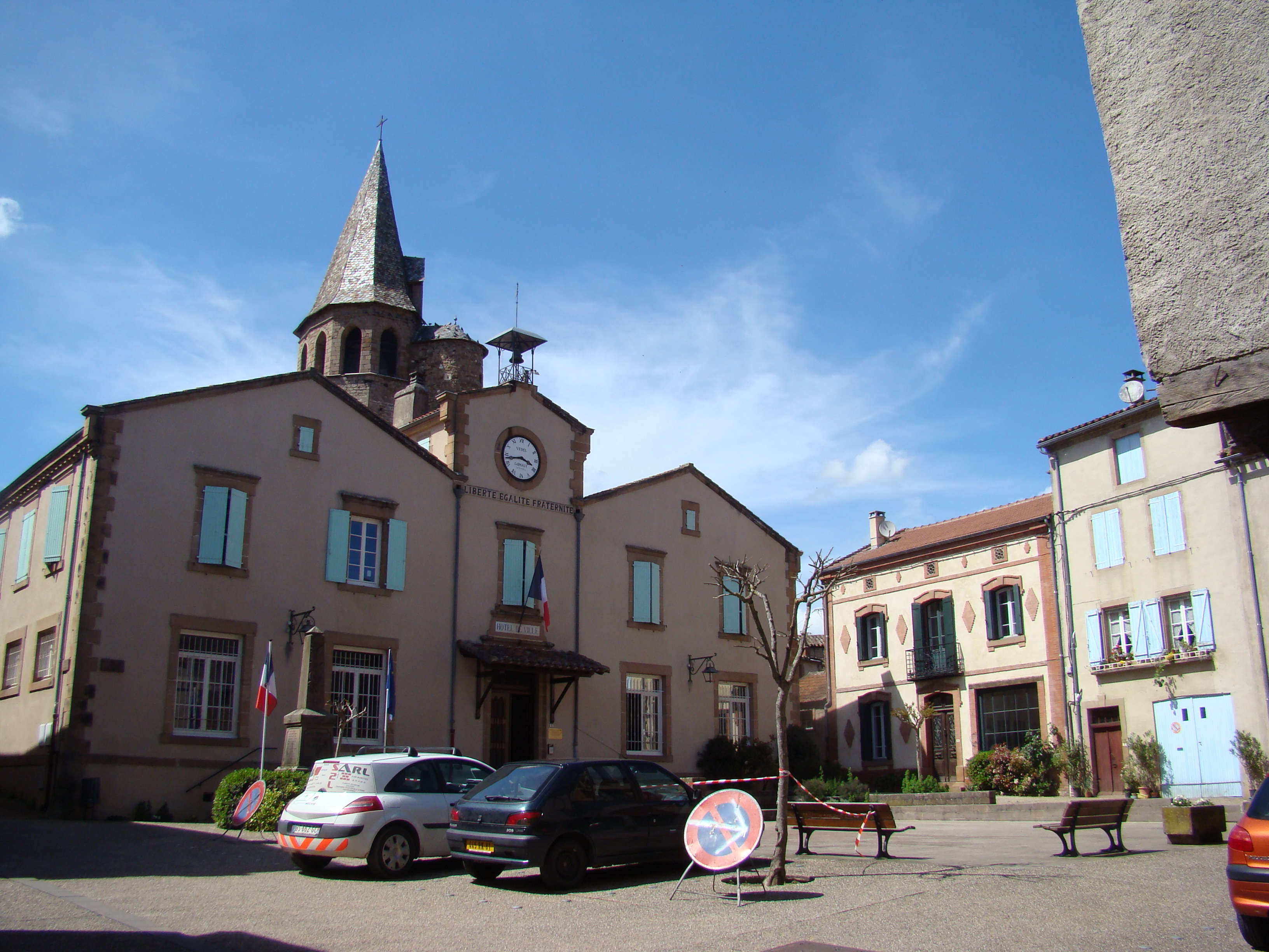 Place de la mairie